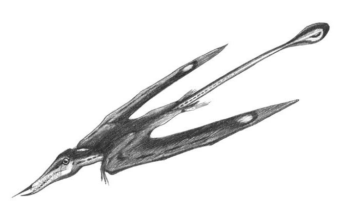 Pterosaur/Flugsaurier Rhamphorynchus gemmingi